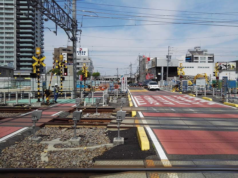 The level crossing at east of Chiryu station and staff controlling traffic